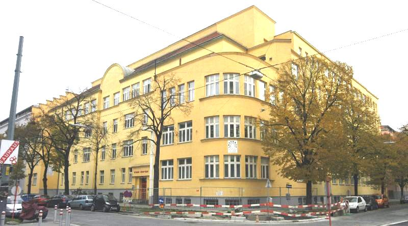 ehemaliges Brigittaspital, heute Schülerheim in der Stromstraße nahe Höchstädtplatz in Wien-Brigittenau